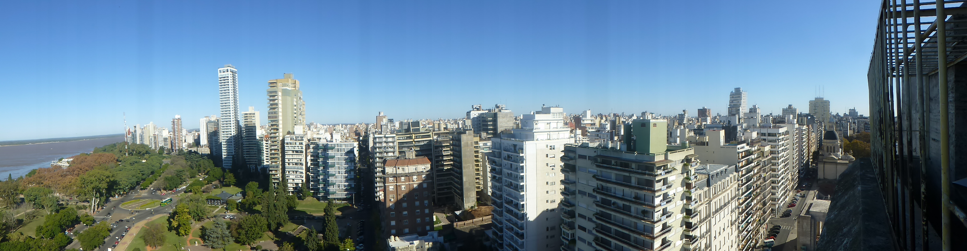 Panorámica desde Monumento a la Bandera (Rosario)